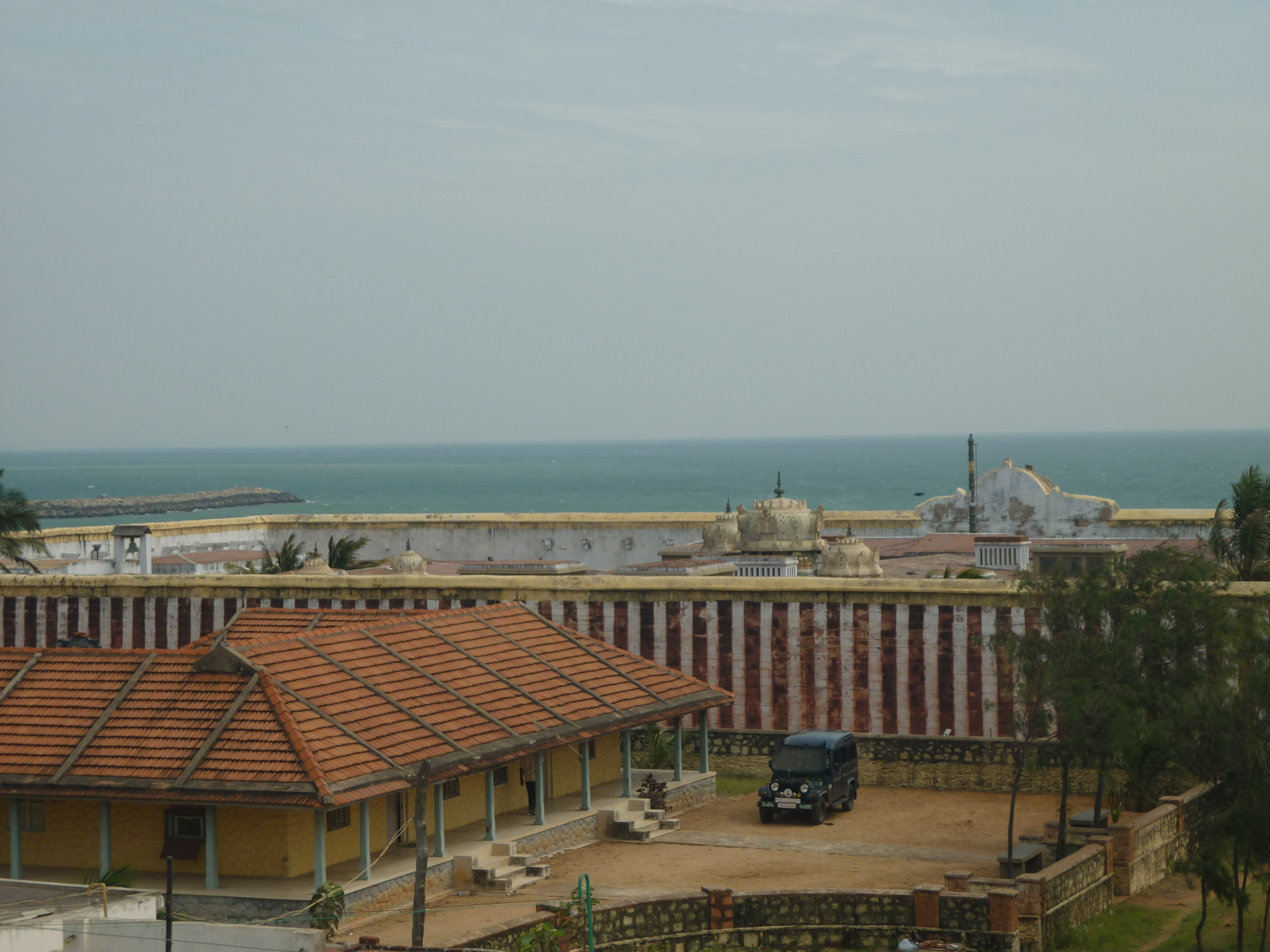 காந்தி மண்டபத்திலிருந்து குமரியம்மன் கோவில்